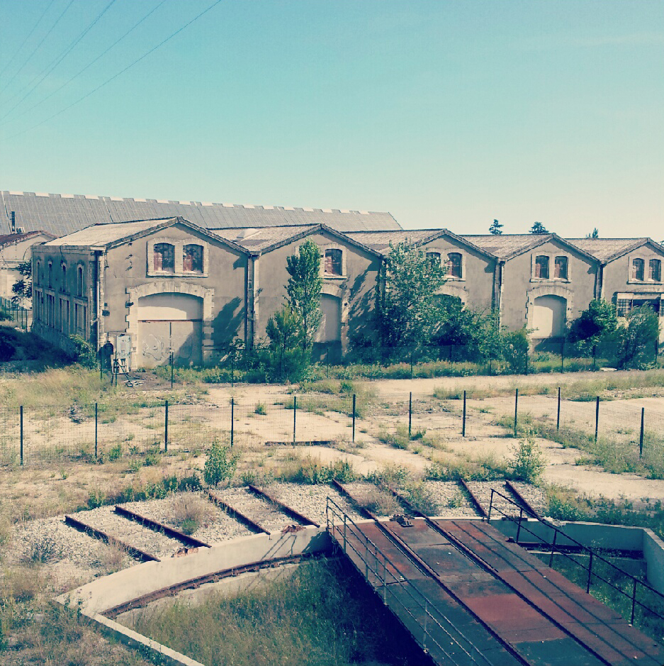 Anciens ateliers SNCF Arles.